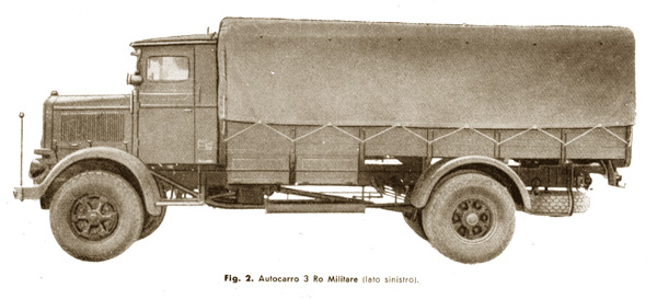 autocarro pesante